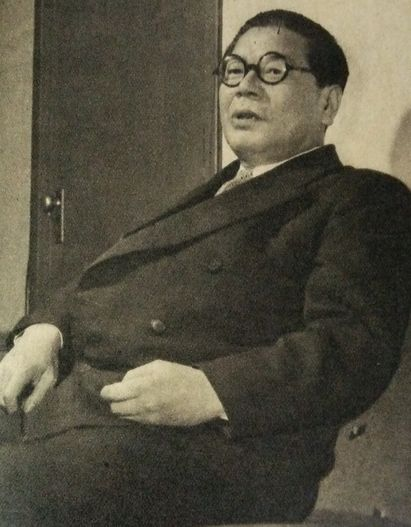 小沢佐重喜